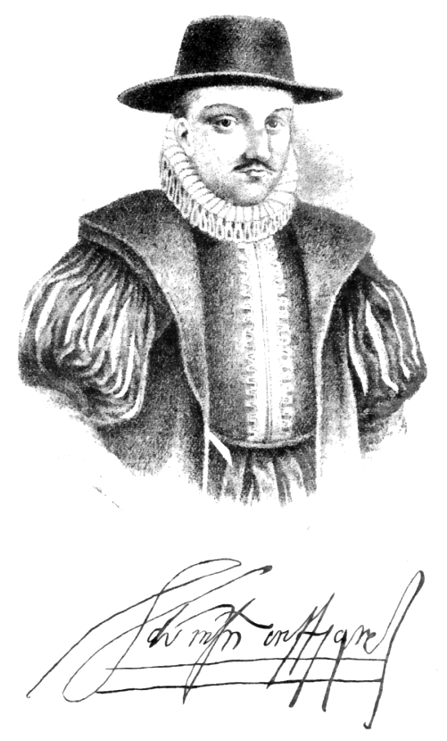 Don Martín Enríquez de Almanza, Virrey de Nueva España (1568-1580) y virrey del Perú (1581-1583)